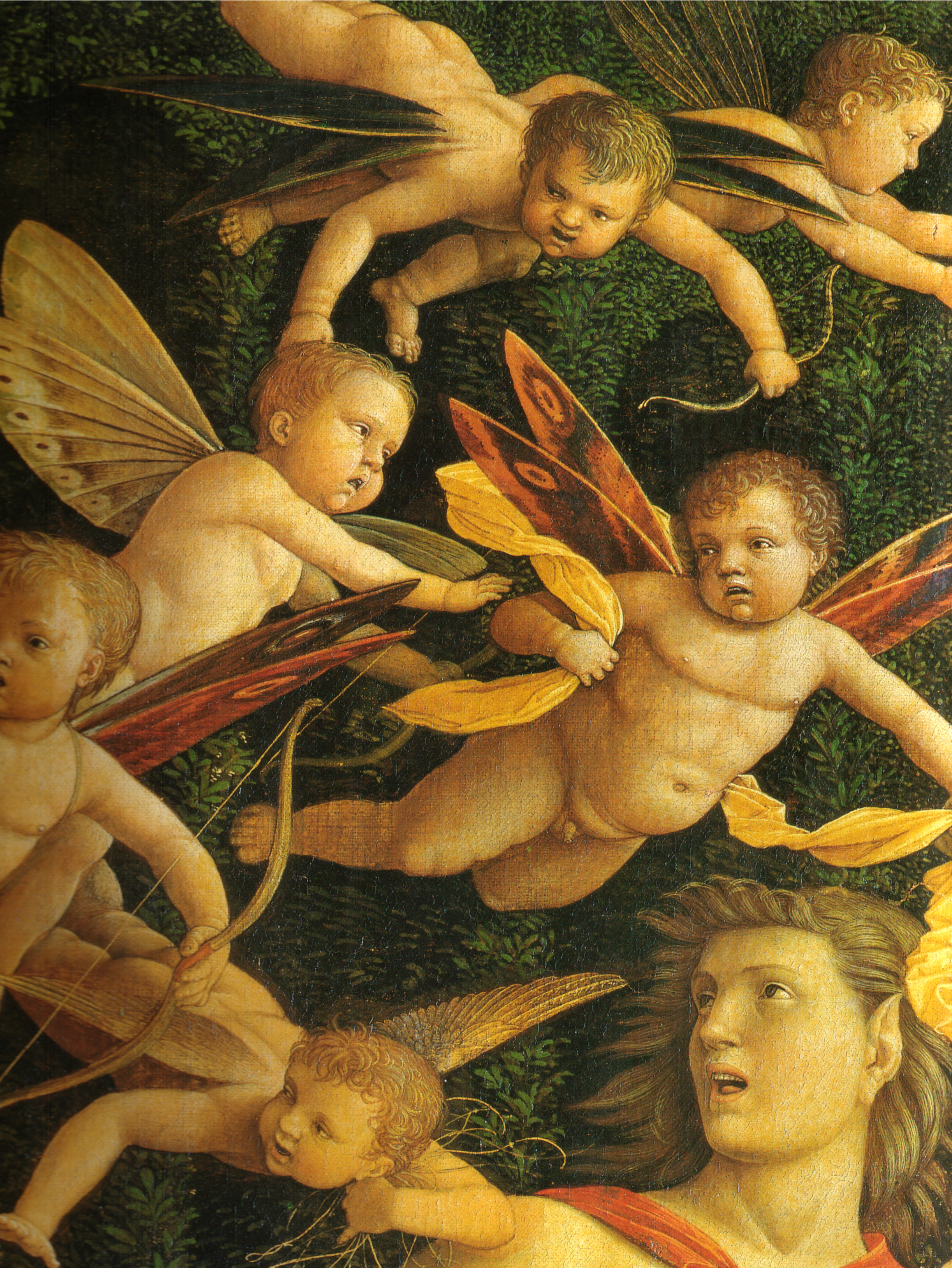 detail